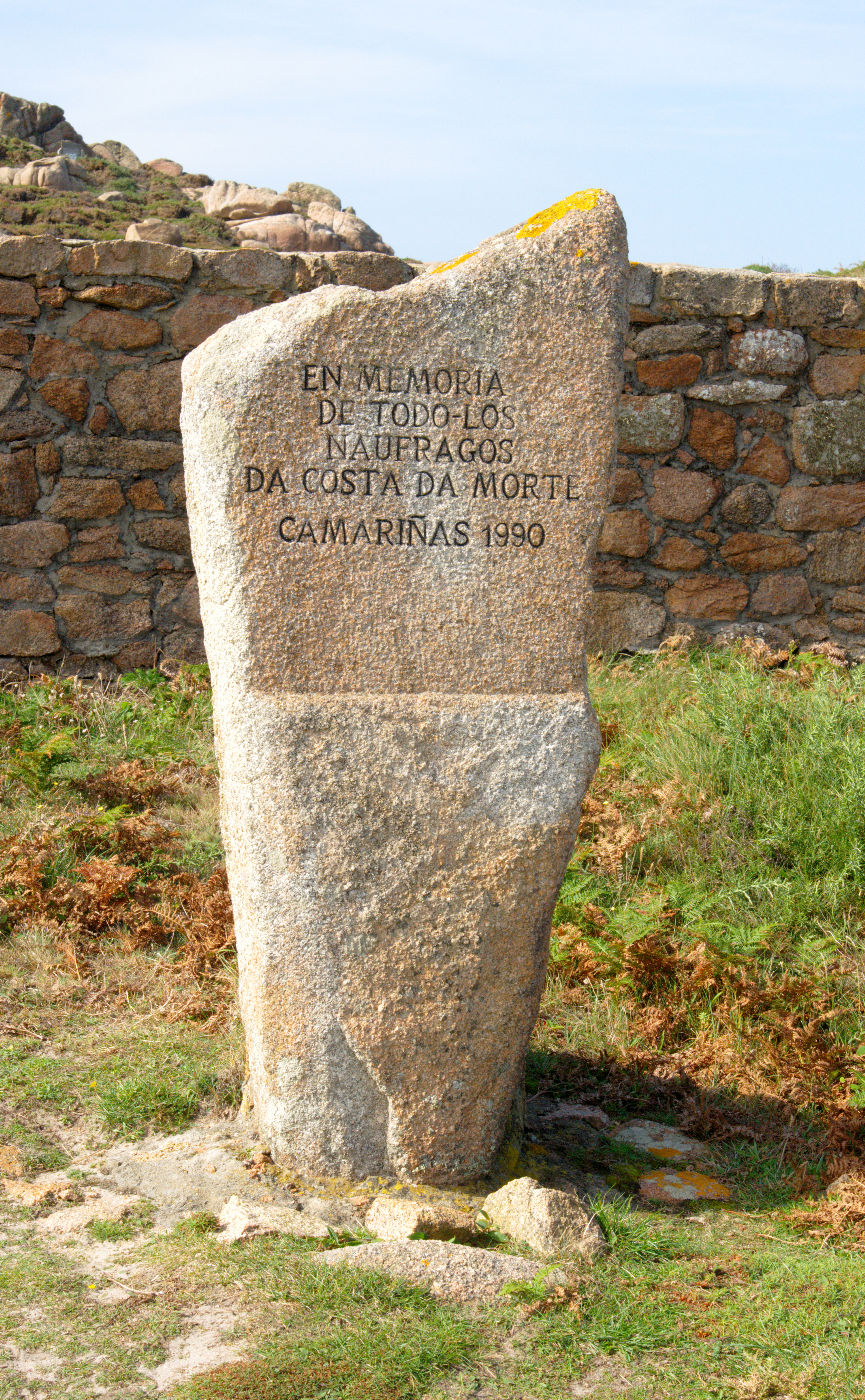 Monumento para los náufragos de la Costa da Morte, en el Cementerio de los Ingleses en Camariñas, Galicia